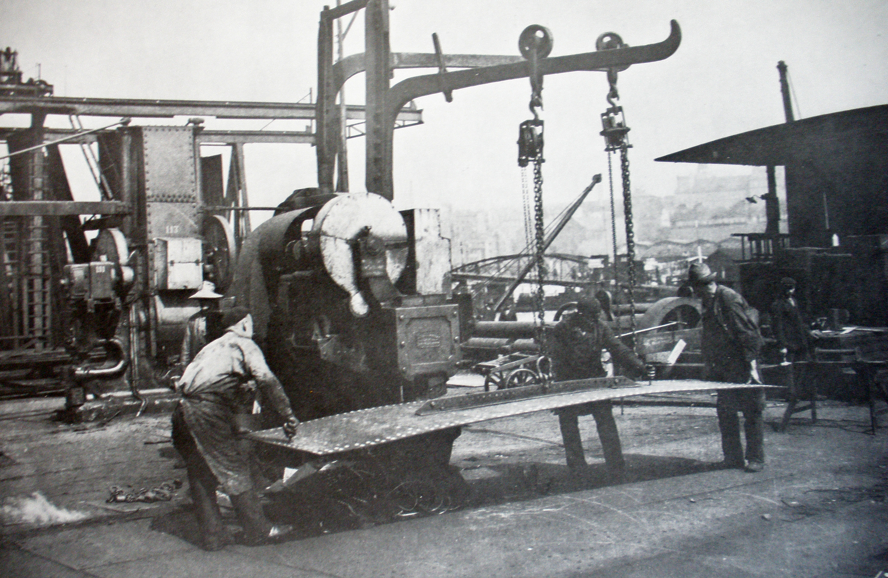 Werft Heinrich Brandenburg Hamburg - Steinwerder: Bearbeiten von Schiffbaustahl an der Dampfschere und Lochstanze